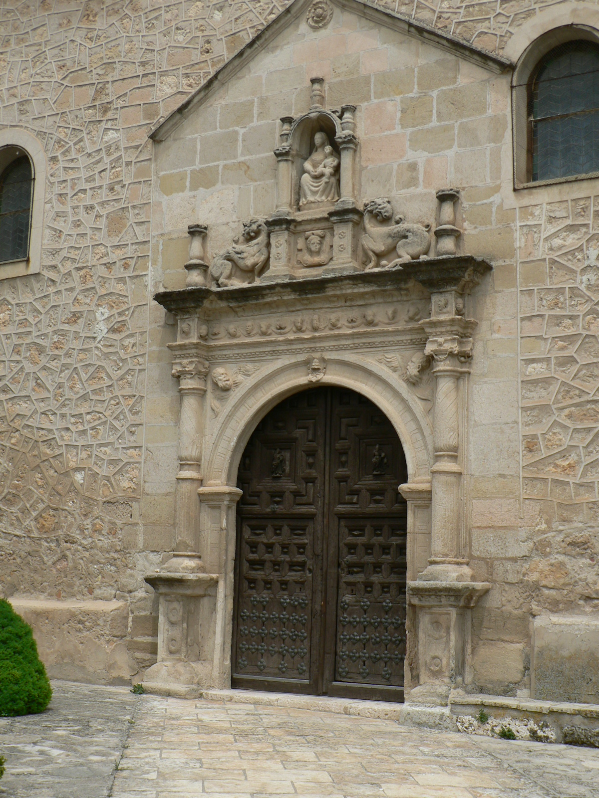 Budia-La portada, de estilo plateresco, se habría edificado a mediados del siglo XVI. Hay que destacar las cabezas de San Pedro y San Pablo, de tamaño natural, colocadas en los lados de la puerta y encima están las caras de los 12 apóstoles.